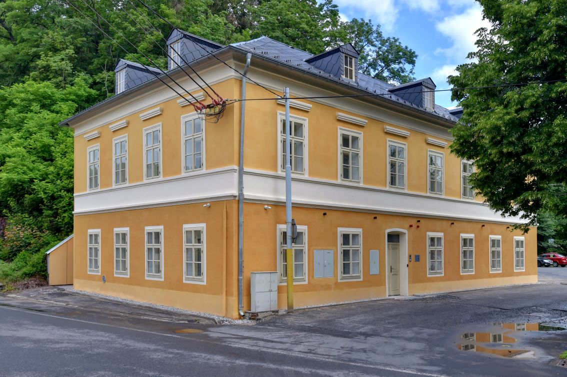 Budova tzv. Hotelu Praha, Kyselka č.p. 74, po rekonstrukci, pohled od hlavní silnice.